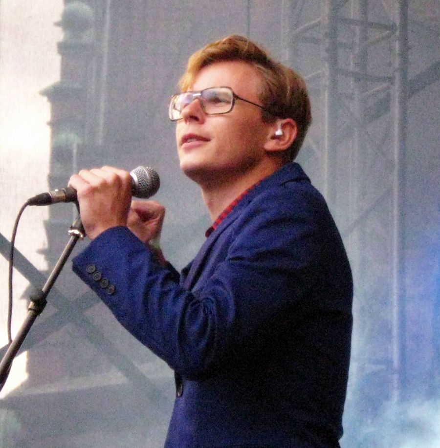 Lars Malm (Nordstrøm)